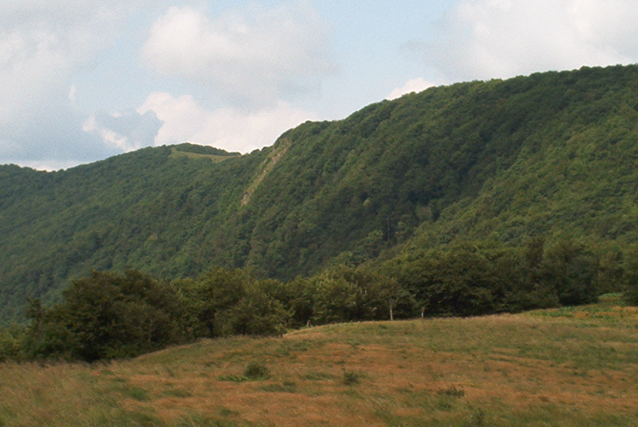 Rabia Skala mountain